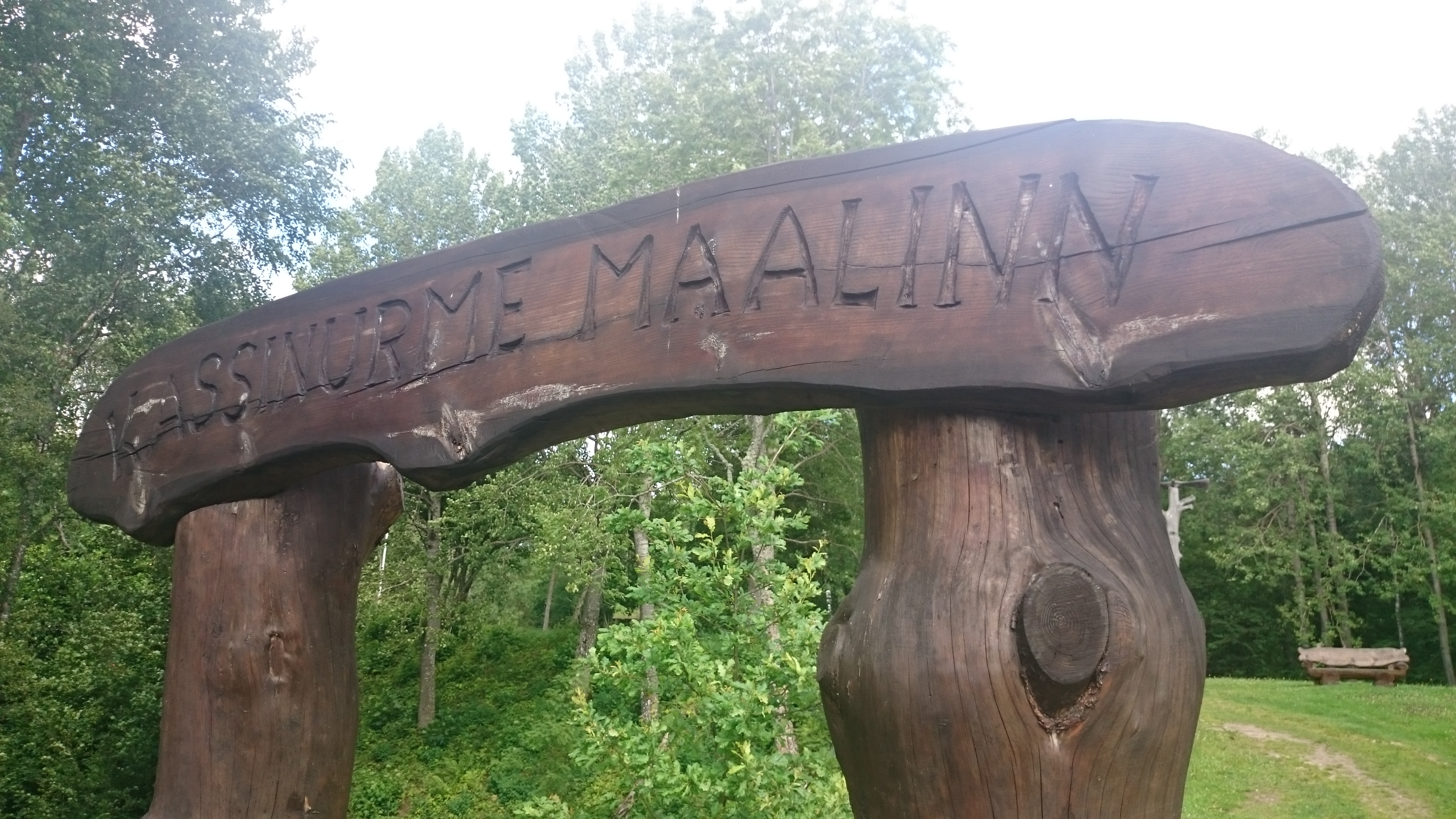 Kassinurme maalinna sissepääs